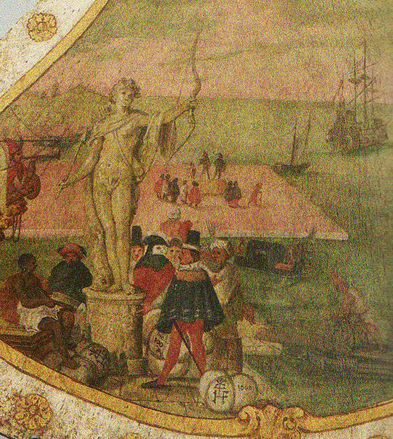 Ölgemälde einer venezianischen Szene auf Walschulterblatt